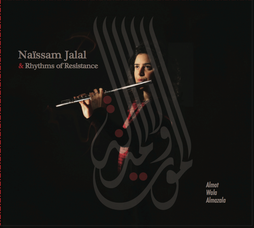 Naïssam Jalal & Rhythms of Resistance - Almot Wala Almazala (2016 - Les couleurs du son)